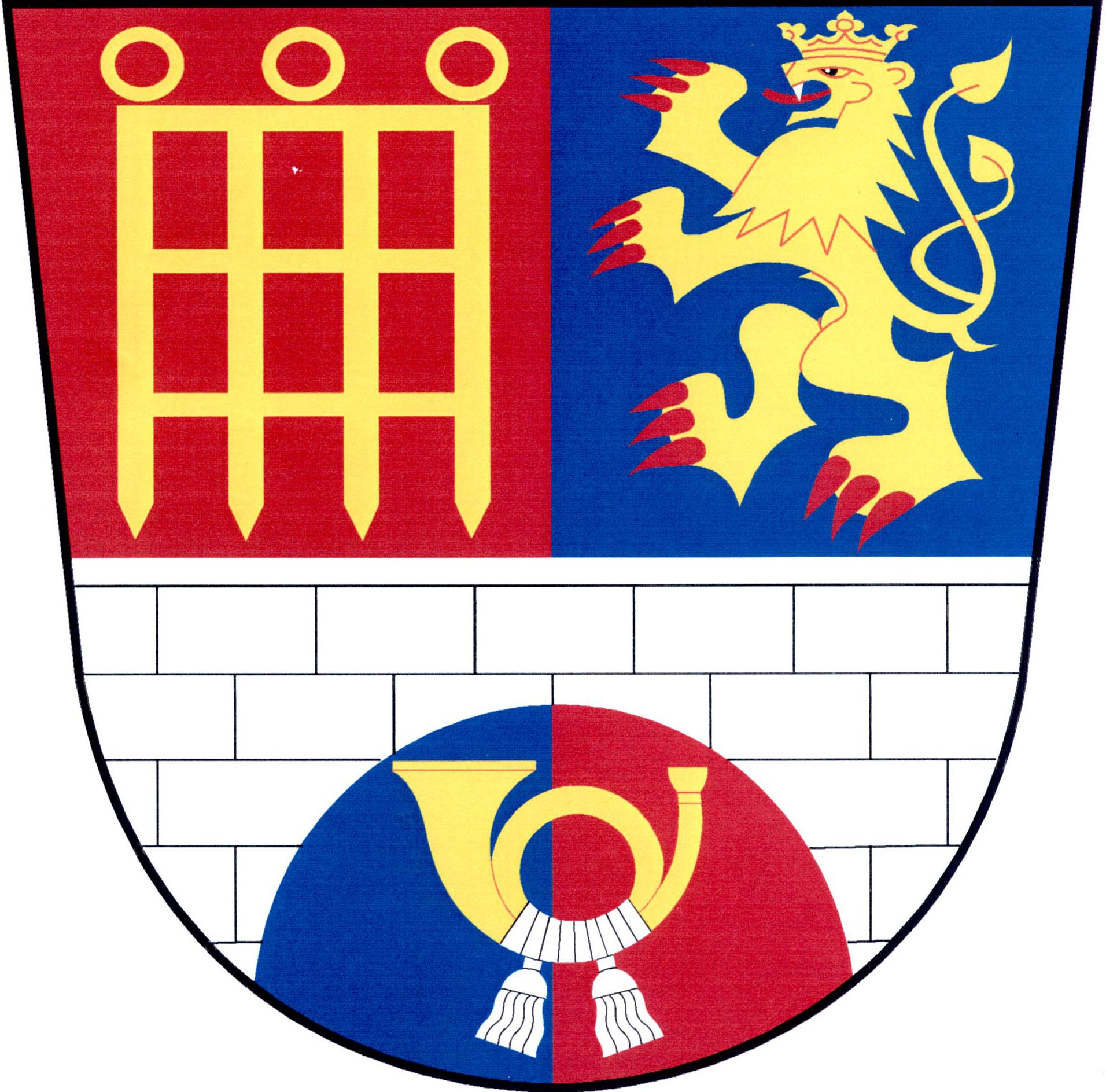 Znak obce Grešlové Mýto v okrese Znojmo. V červeno-modře čtvrceném štítě stříbrný kvádrovaný most, nad ním vpravo zlatá padací mříž, vlevo korunovaný zlatý dvouocasý lev s červenou zbrojí, pod obloukem zlatá poštovní trubka obtočená stříbrnou šňůrou se dvěma třapci.